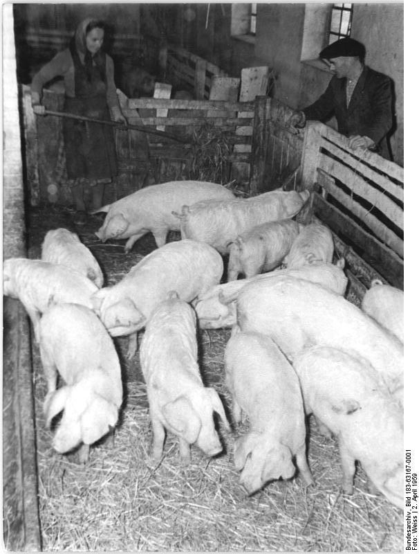 Klein-Eichholz, Bauern im Schweinestall Zentralbild Weiss 2.4.1959 Genossenschaftsbauern erzeugen mehr Schweinefleisch. Durch den Umbau von zwei alten Ställen konnte die LPG "Makarenko" in Klein-Eichholz, Kreis Königswusterhausen in einem Jahr ihren Bestand von 130 auf 300 Schweine erhöhen. Durch verstärkte Sauenhaltung von 18 Sauen 1958 auf 42 heute - kann die Genossenschaft auf den Läuferzukauf verzichten und darüberhinaus noch in diesem Jahr 150 Läufer abgeben. UBz: In einem der umgebauten Ställe arbeitet die Genossenschaftsbäuerin Luzie Schreiber. Rechts der Vorsitzende Walter Iwohn, ehemaliger MTS-Agronom."